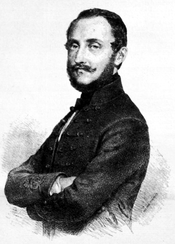 Somssich Pál (1811–1888) politikus, publicista, a képviselőház elnöke portréja. Barabás Miklós rajza (1851)